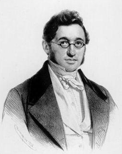 Portrait de Guillaume Van Volxem, bourgmestre de Bruxelles